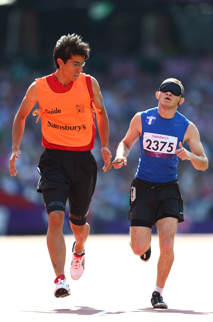 El atleta ciego Luis Carlos Hernández jundo Maxim corredor guía Maxin Espina durante su participación en los Juegos Paralímpicos de Londres 2012